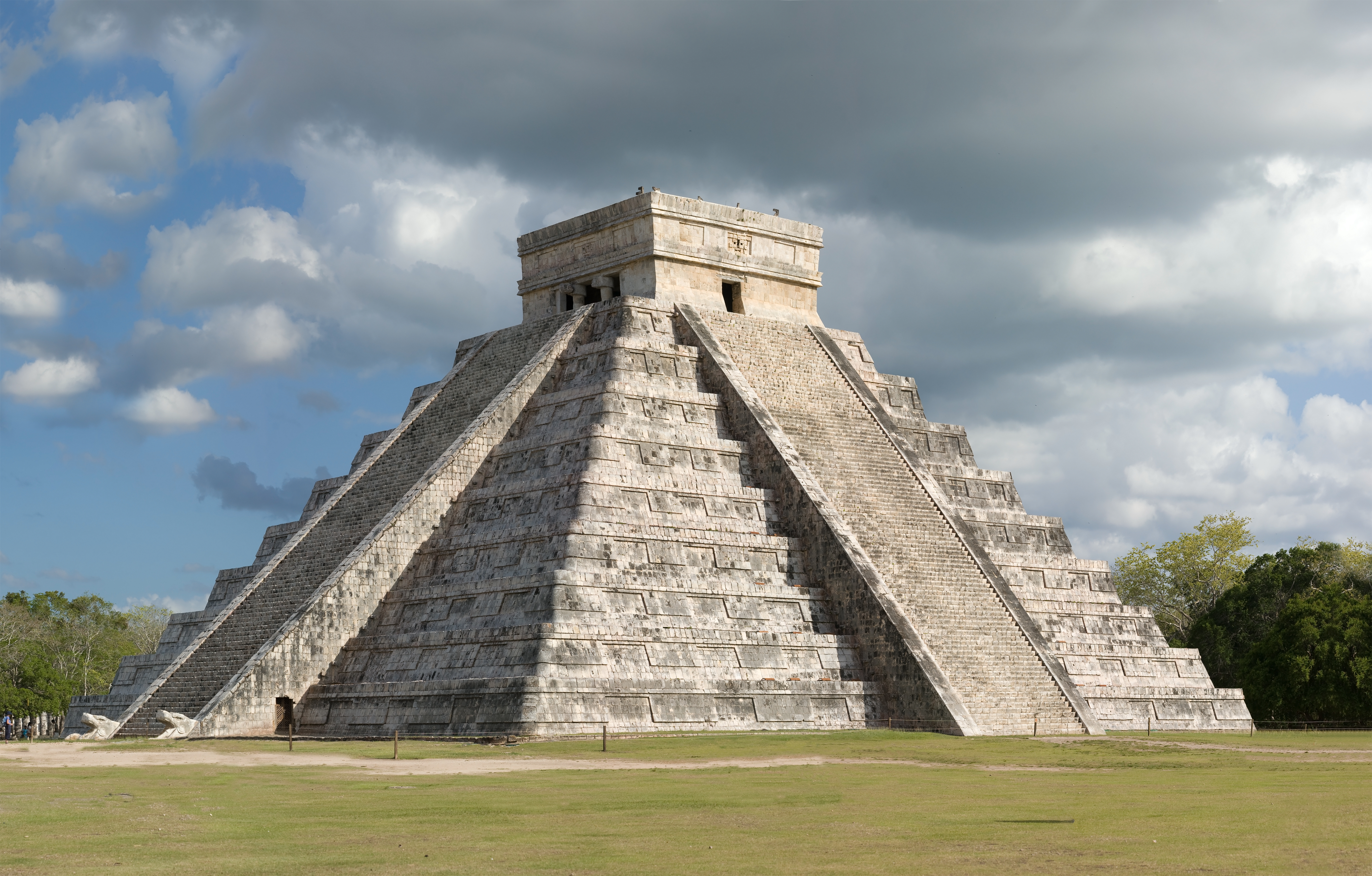 El Castillo at Chichen Itza Il tempio di Kukulkán a Chichen Itzá, la zona archeologica situata nella penisola dello Yucatan in Messico.